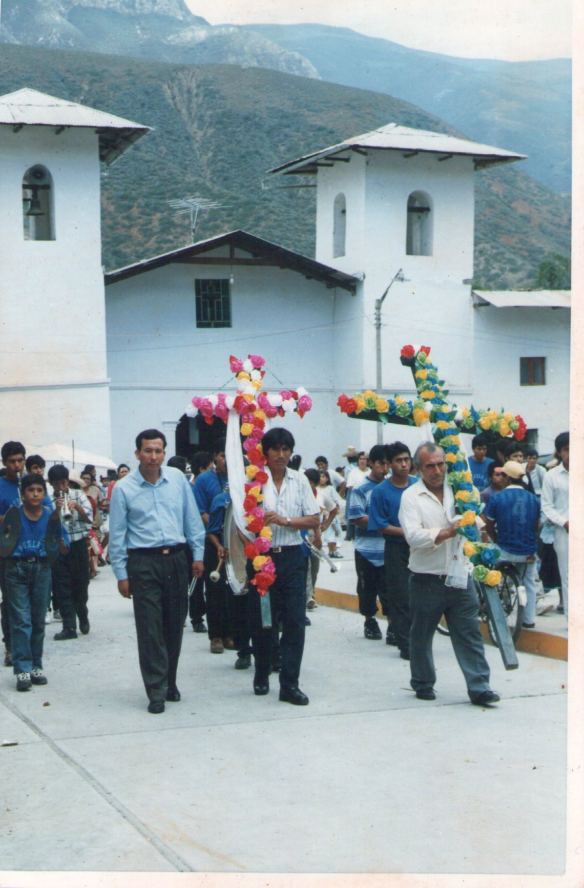 Fista de las Cruces en el Distrito de Magdalena, Cajamarca